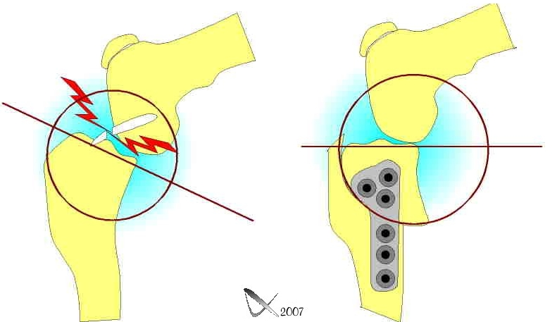 tplo scheme